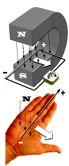 određivanje smjera inducirane struje